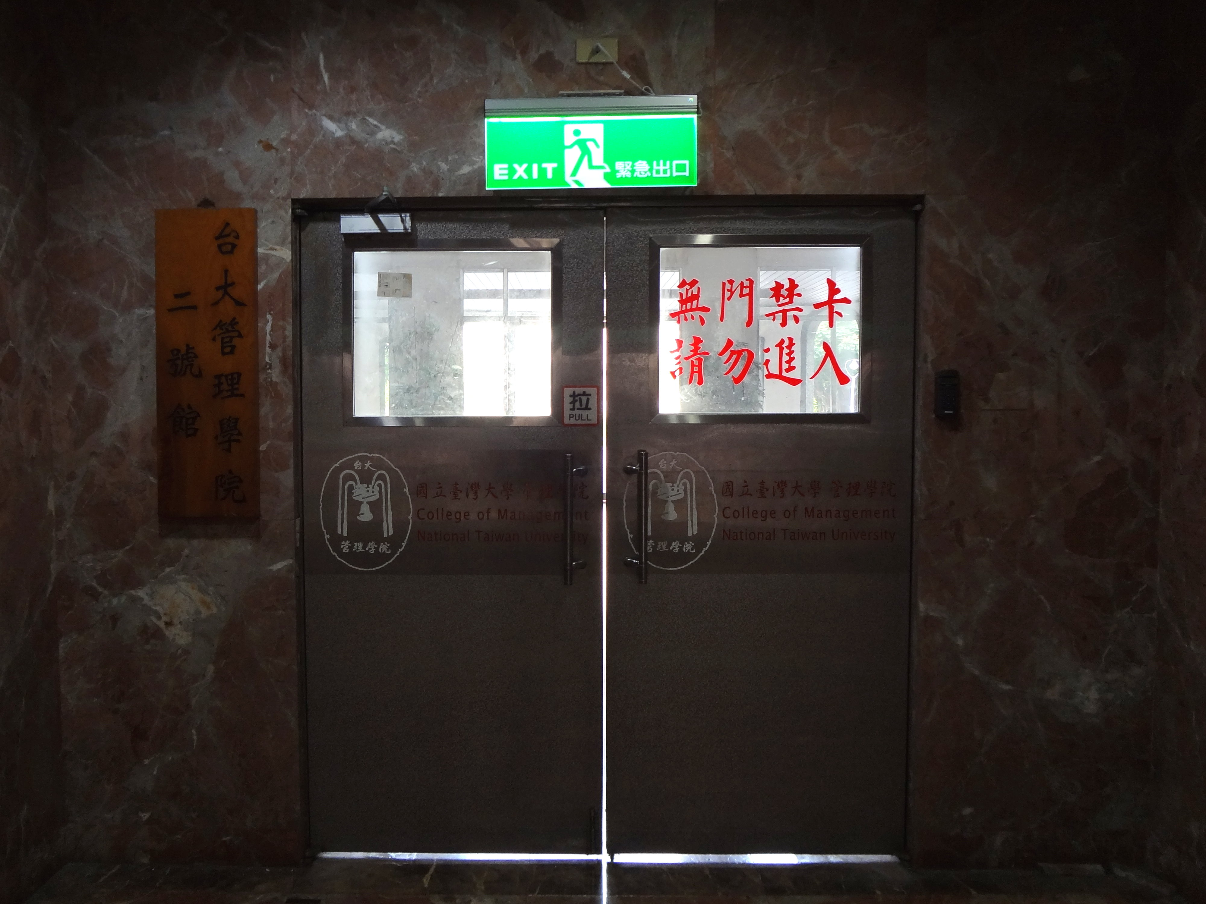 中文（台灣）: 國立臺灣大學第二學生活動中心通往管理學院二號館的管制門，位於一樓大廳，左側掛管理學院二號館木牌。